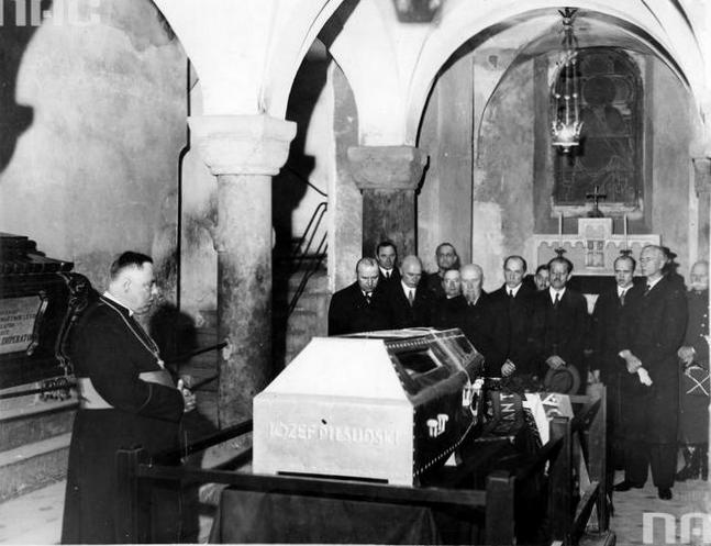 Uczczenie pamięci marszałka Polski Józefa Piłsudskiego w Krakowie. Przedstawiciele Sejmu i Senatu przy sarkofagu marszałka Józefa Piłsudskiego w krypcie św. Leonarda na Wawelu. Widoczni m.in.: od lewej, pierwszy rząd: marszałek sejmu Stanisław Car, senator Mikołaj Kwaśniewski, marszałek senatu Aleksander Prystor, senator Bogusław Miedziński, senator Leon Kozłowski (w okularach) i wojewoda krakowski Władysław Raczkiewicz (2. z prawej), senator gen. Aleksander Osiński (1. z prawej). W drugim rzędzie stoją: wicemarszałek Sejmu Władysław Byrka (na lewo za L. Kozłowskim) i senator płk Janusz Jagrym-Maleszewski (2. z lewej). Przy sarkofagu stoi proboszcz katedry wawelskiej ks. Stanisław Domasik.